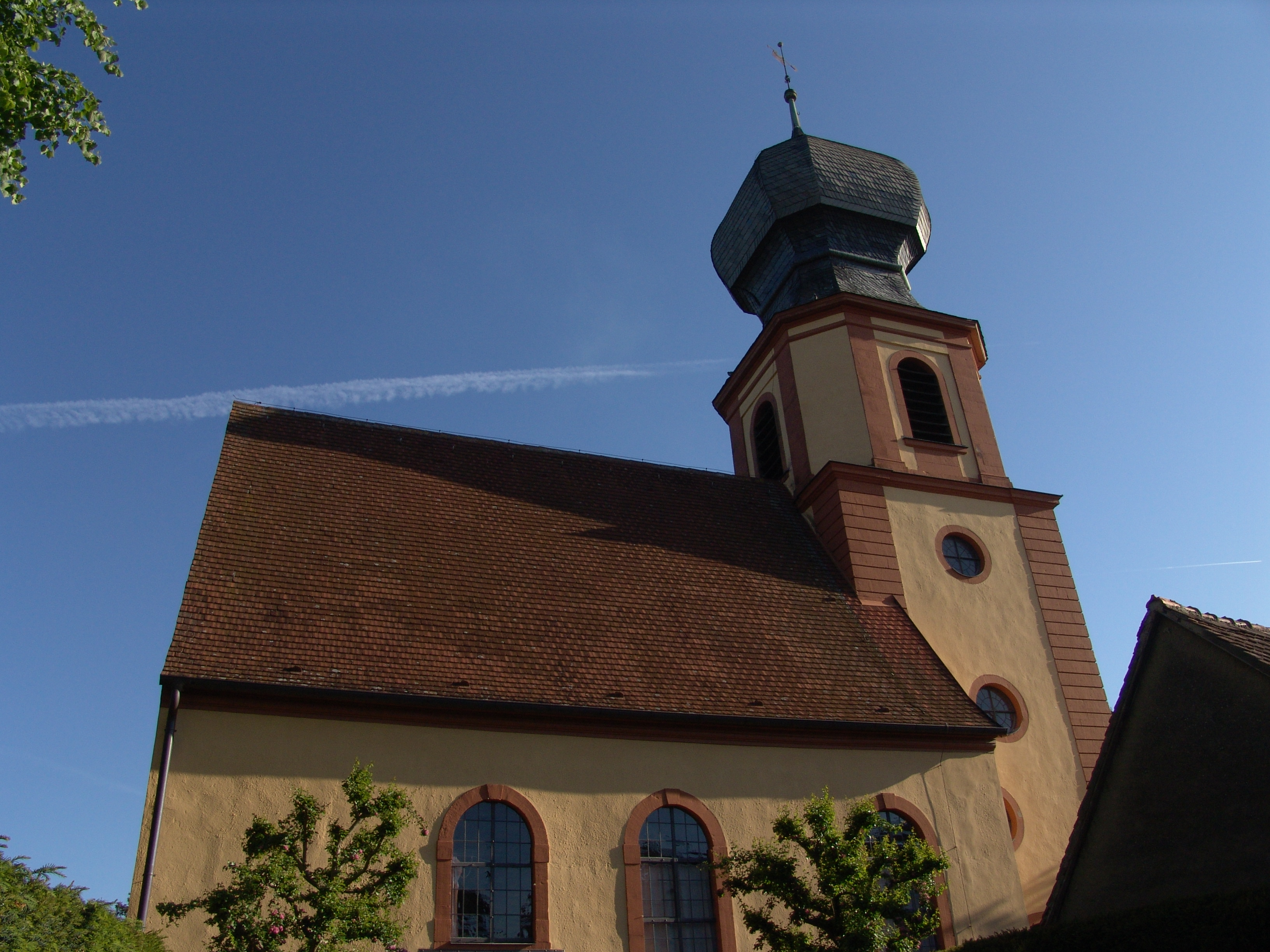 evang.-luth. Kirche St. Nicolai in Neuses am Berg